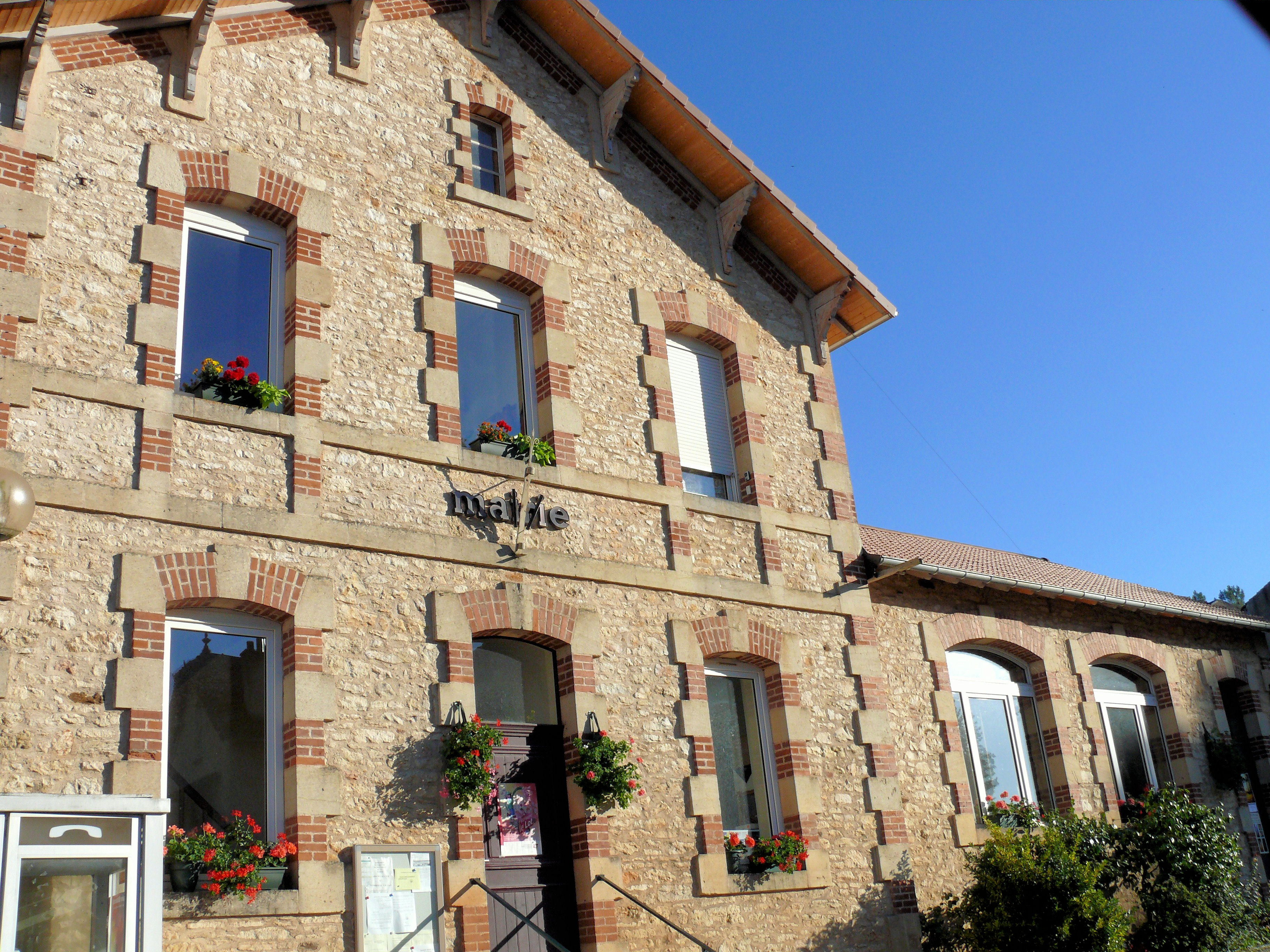 Goujounac - Mairie